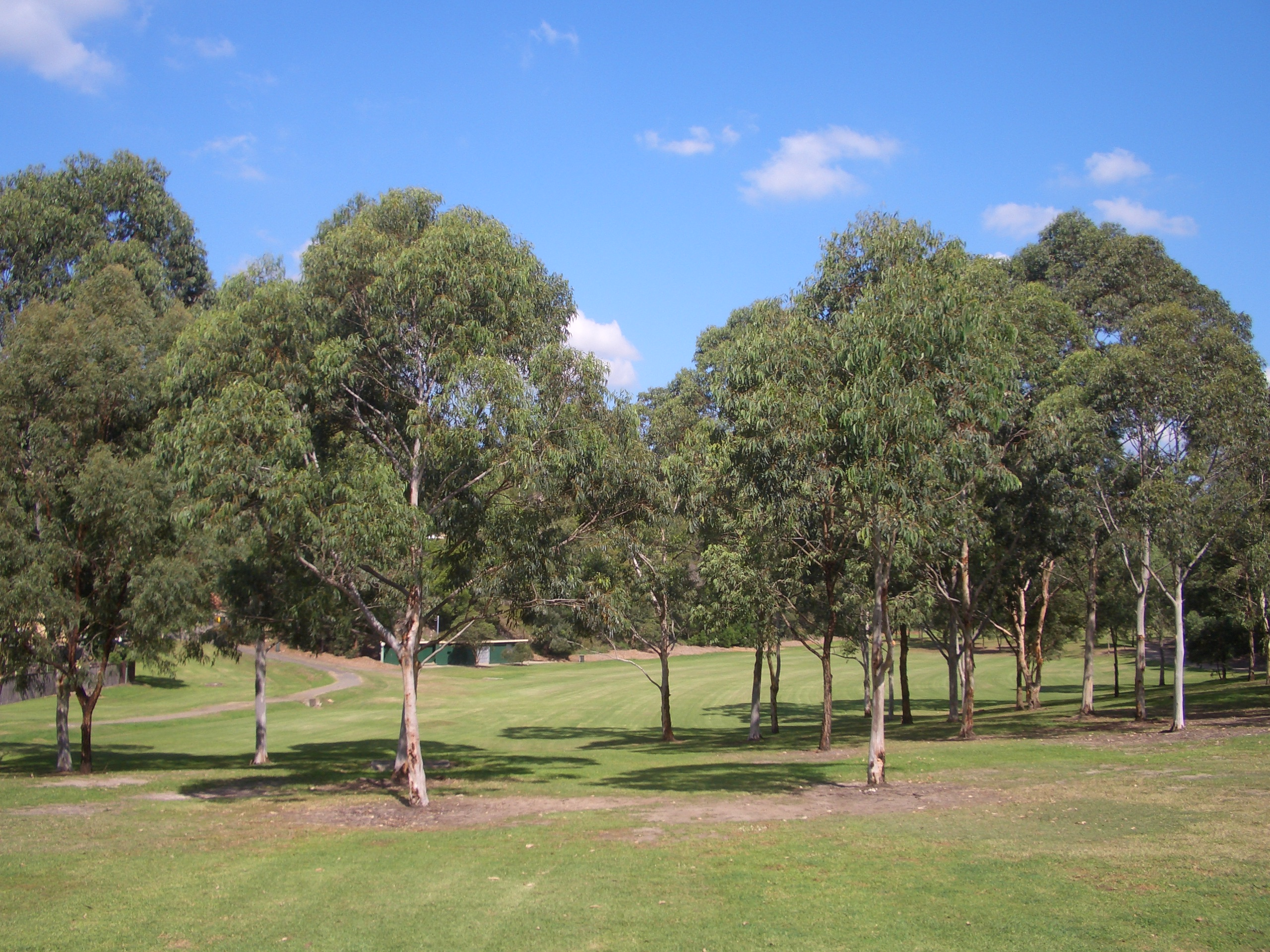 Gannons Park, Peakhurst Heights